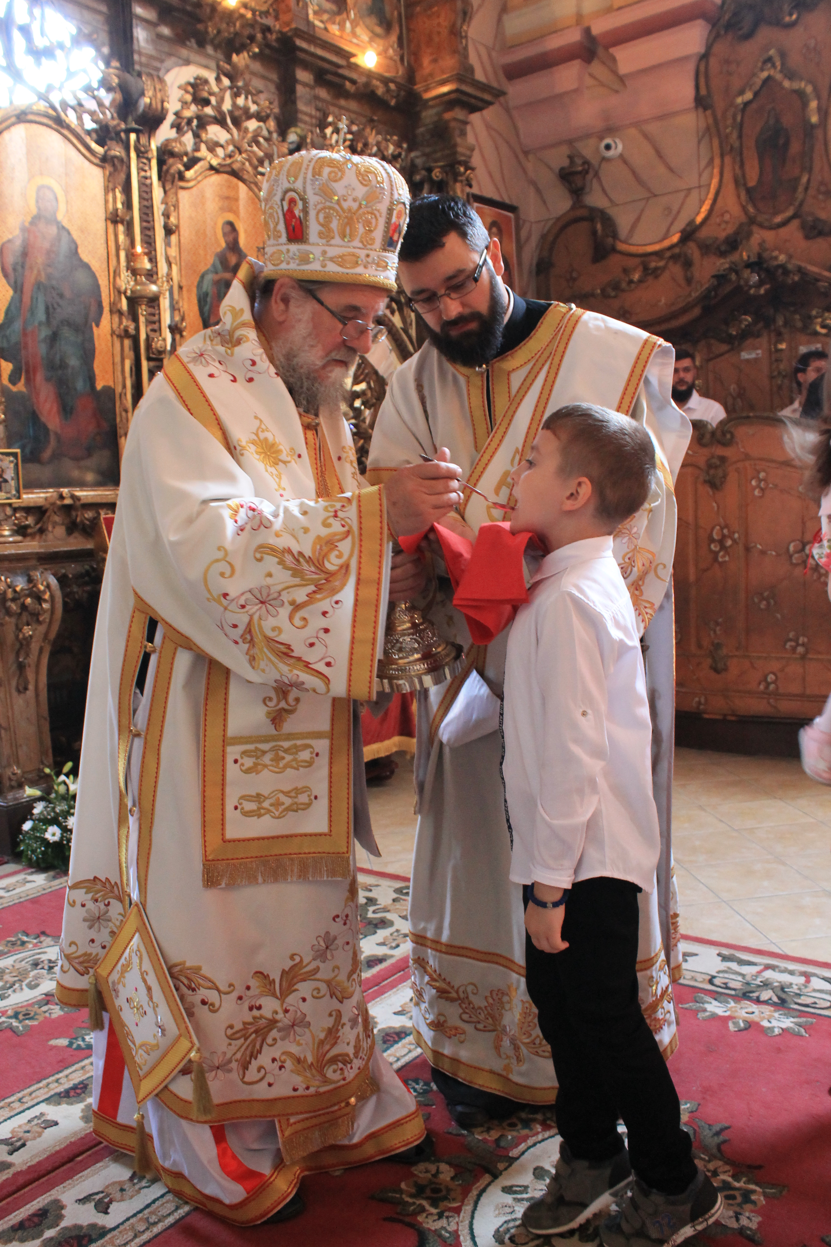 Proslava Slave crkve, Šid 22. maj 2018.